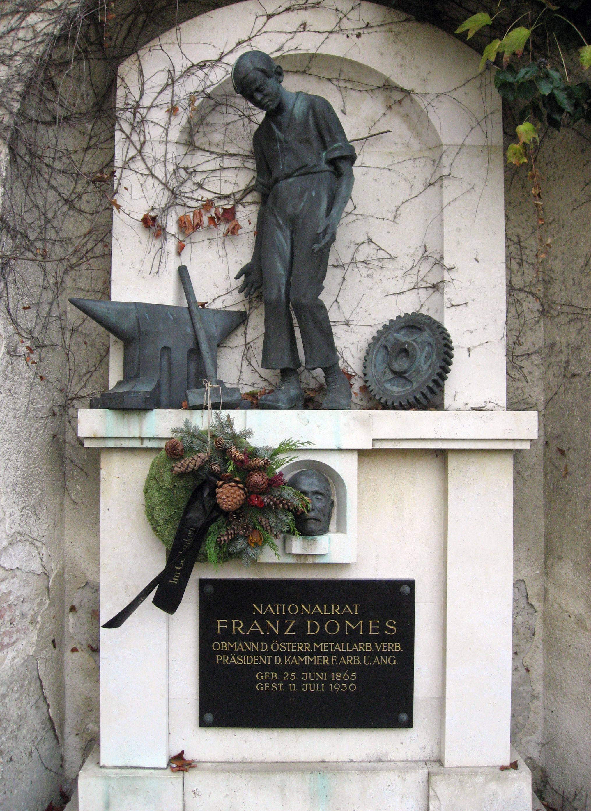 Wien, Feuerhalle Simmering, Urnengrabstelle Franz Domes